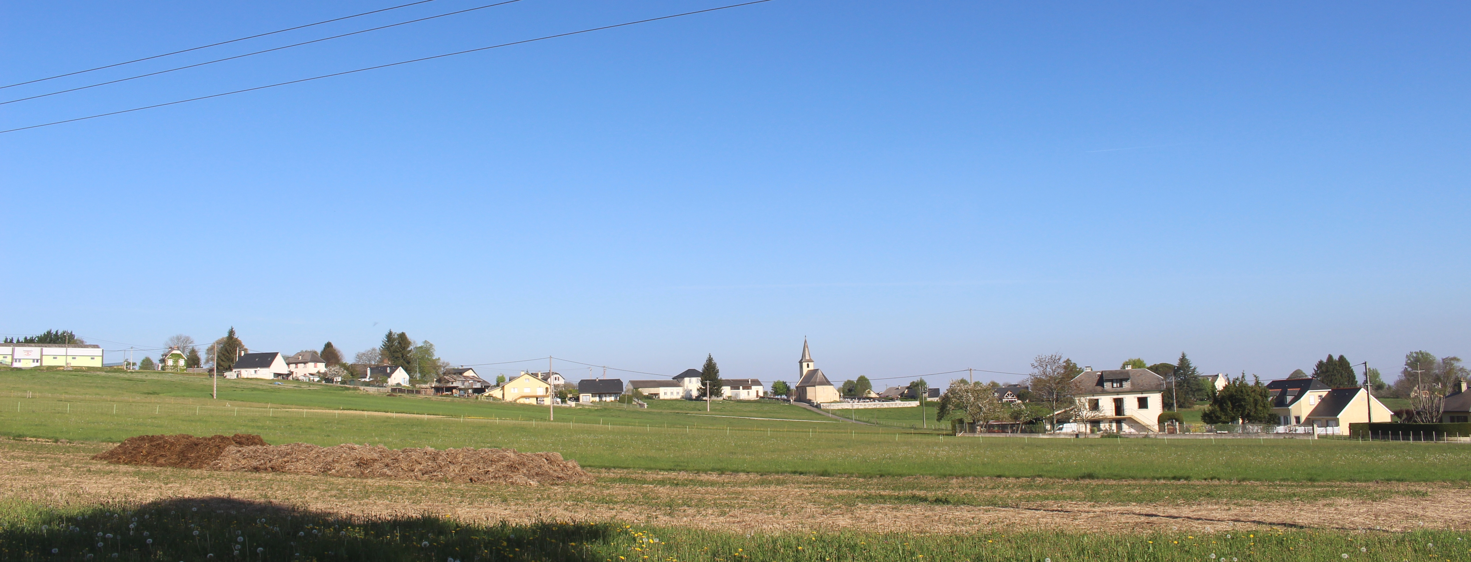 Mérilheu (Hautes-Pyrénées)